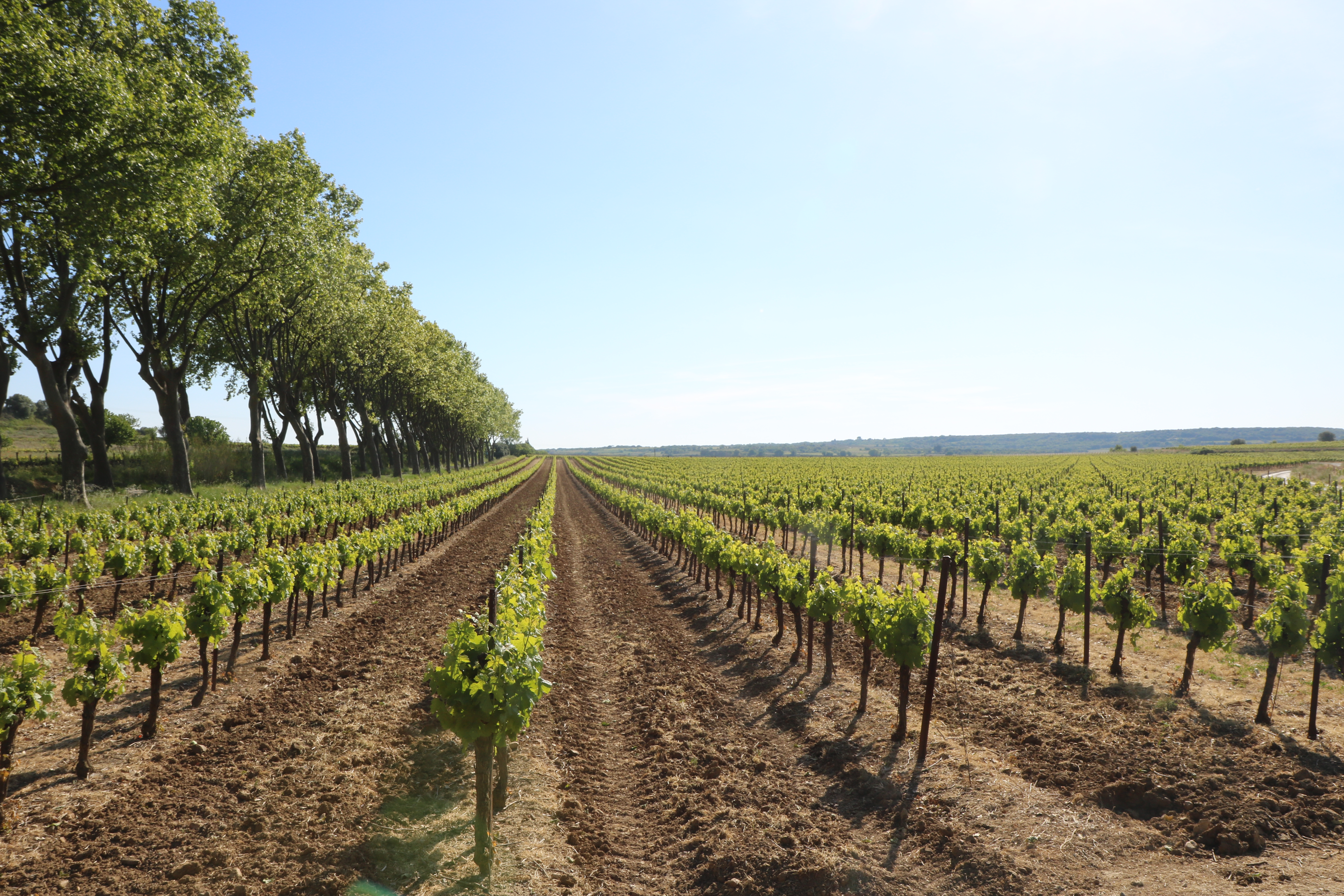 Adissan (Hérault) - vignoble et route de Nizas.